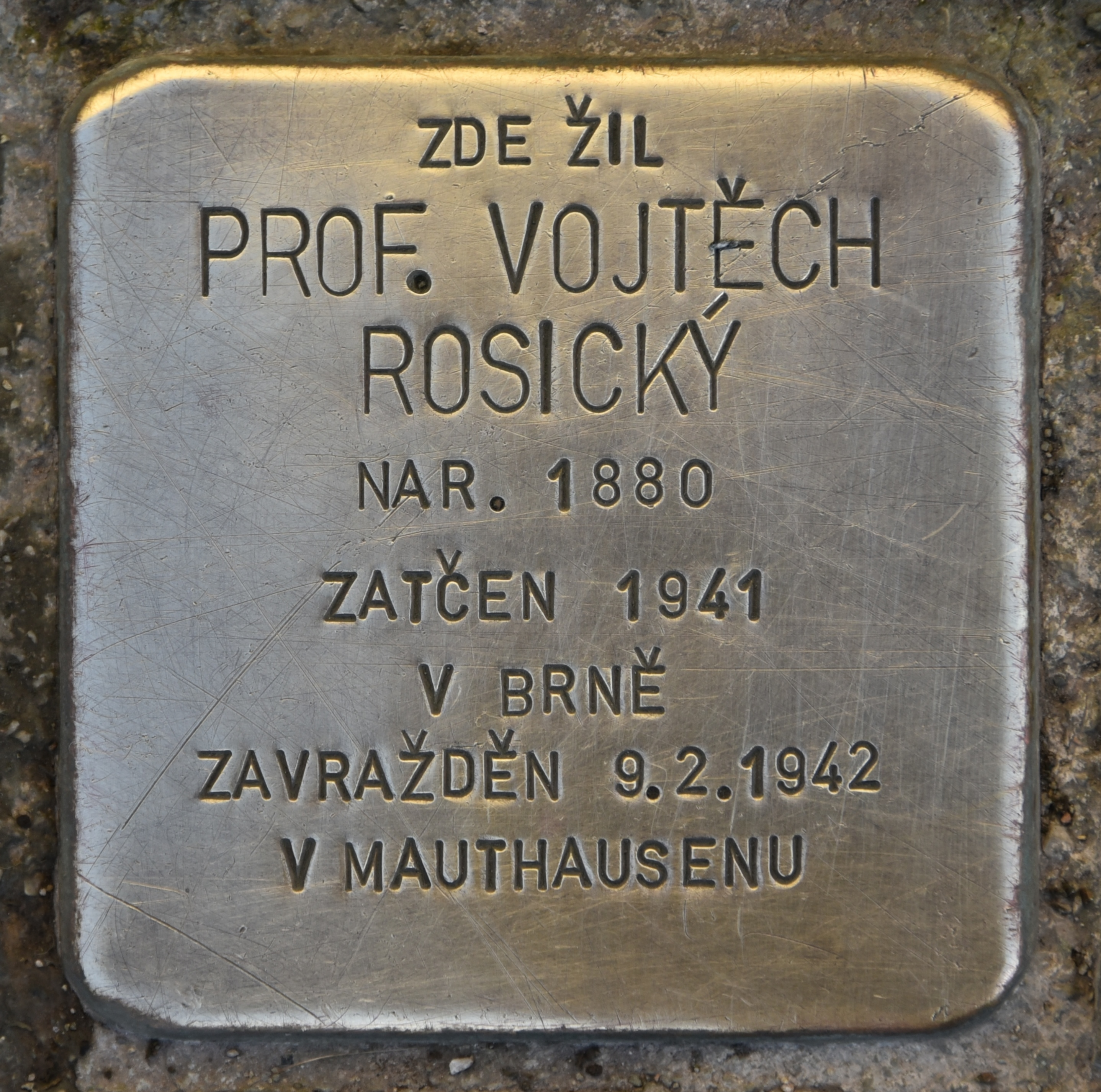 Stolperstein für Vojtech Rosicky